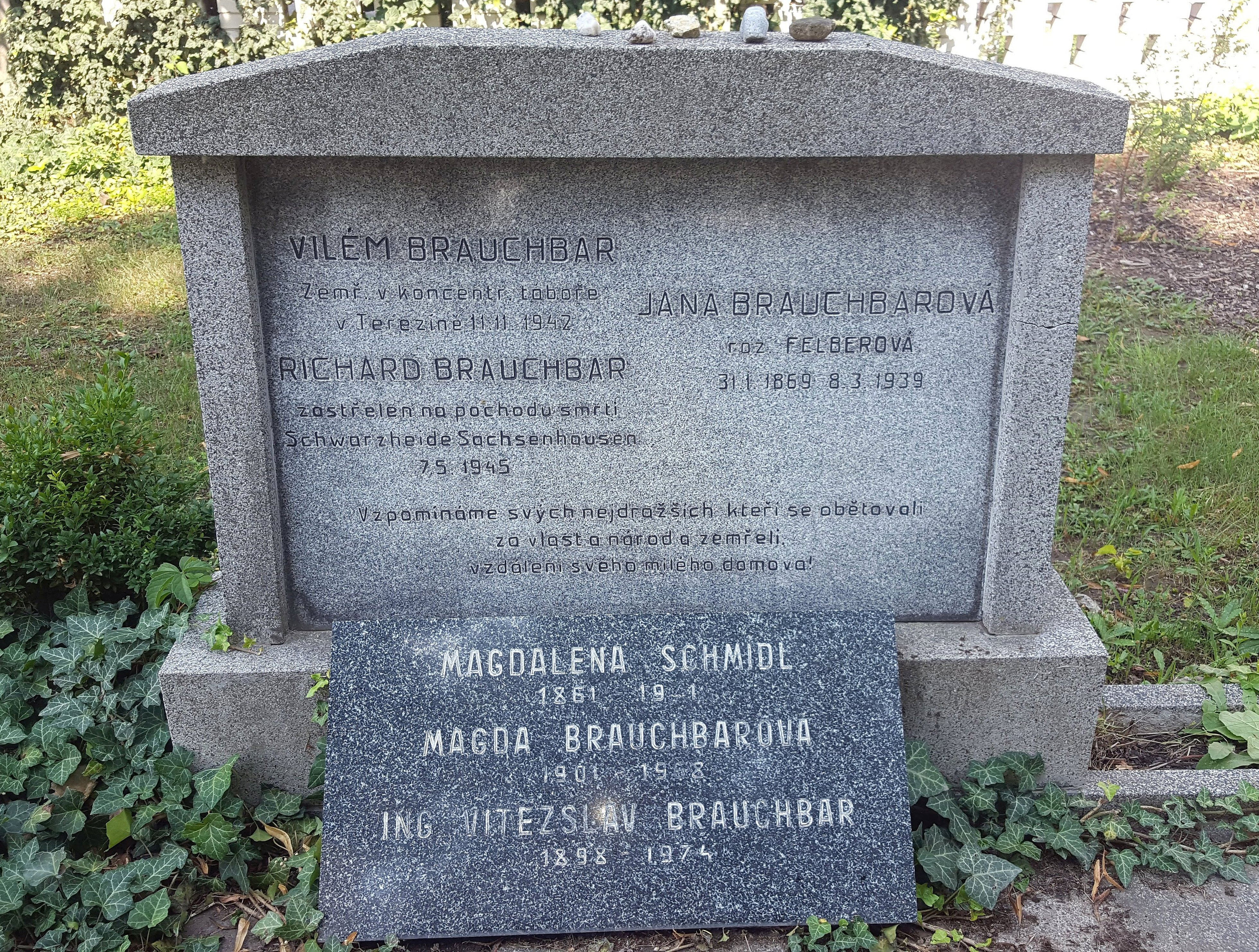 Rodinná hrobka Brauchbarů. Židovský hřbitov Kroměříž